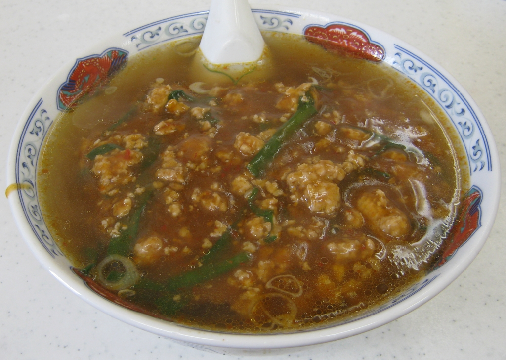 スタミナラーメン